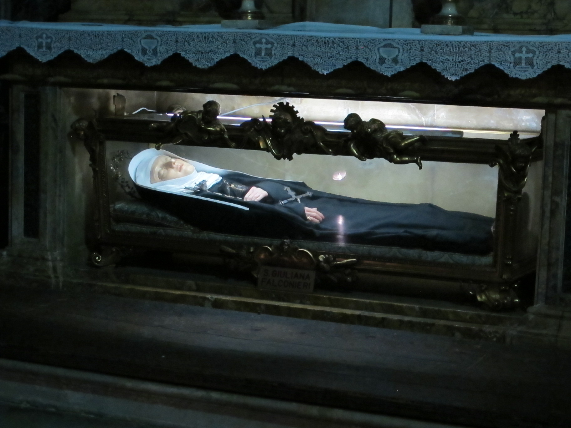 Annunziata, reliquie della beata giuliana falconieri